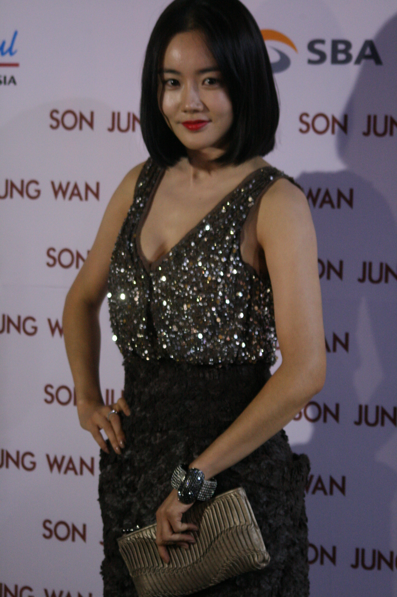 2011 서울패션위크